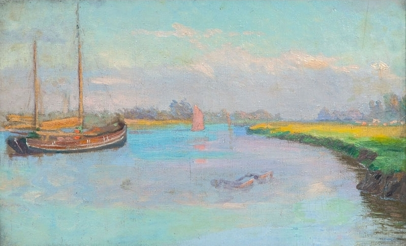 Boote auf der Este, Öl auf Leinwand, 38,5 x 61 cm, auf dem Keilrahmen monogrammiert A.S. u. betitelt